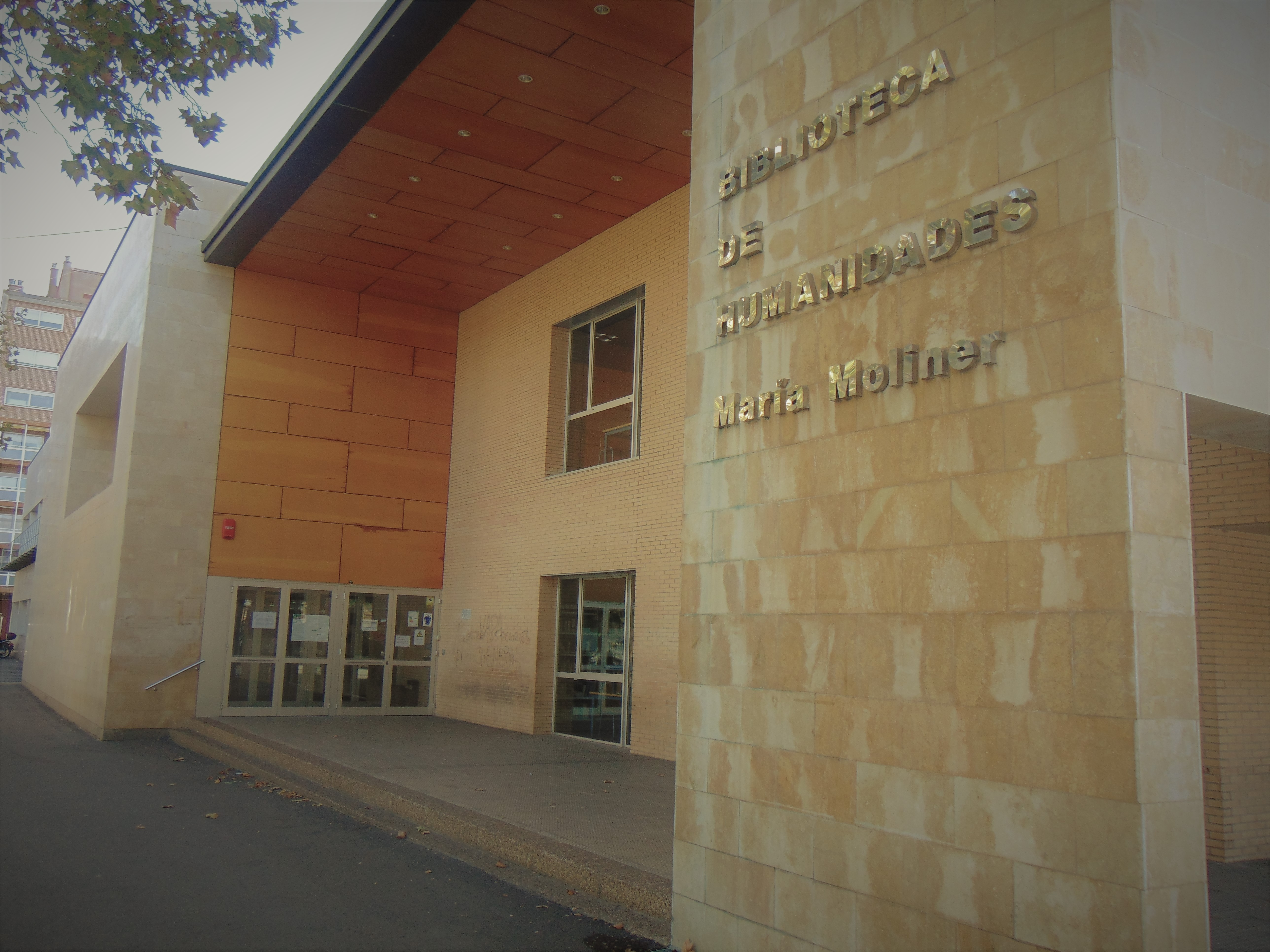 Biblioteca de Humanidades María Moliner. Universidad de Zaragoza. Inaugurada en el año 2003.